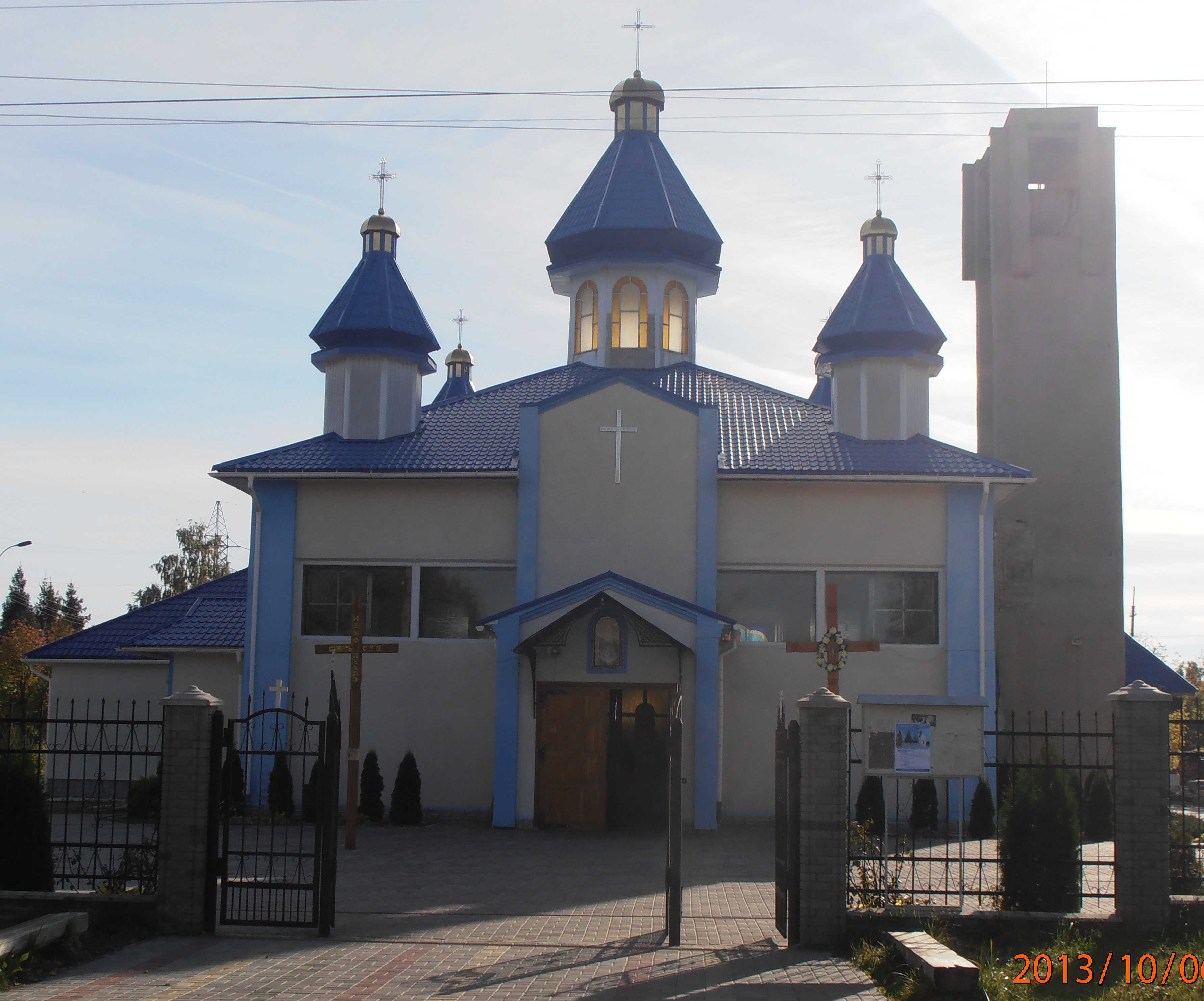 Греко-католицька церква Святого Духа